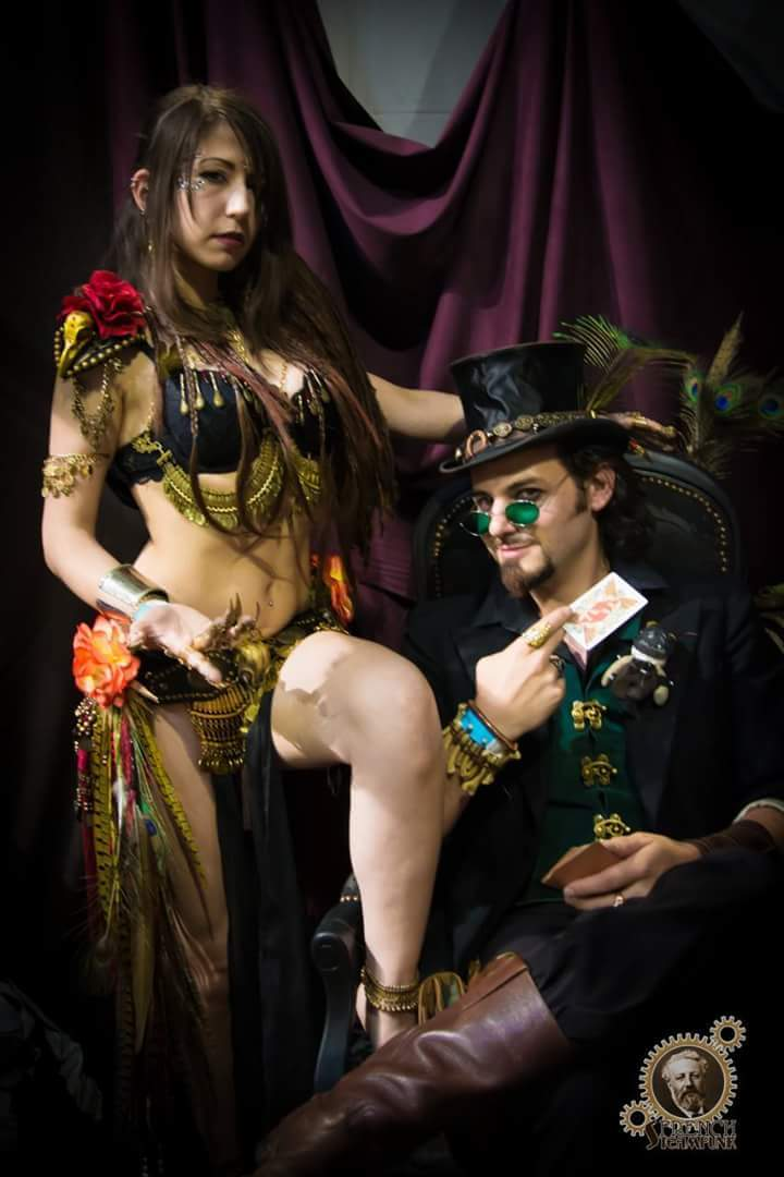 Michaelys Ruby en costume d'inspiration tribale et Léonarius Nomada en costume d'inspiration vaudou. Photo prise lors de la Convention Geekopolis dans le quartier steampunk par Alex LS.